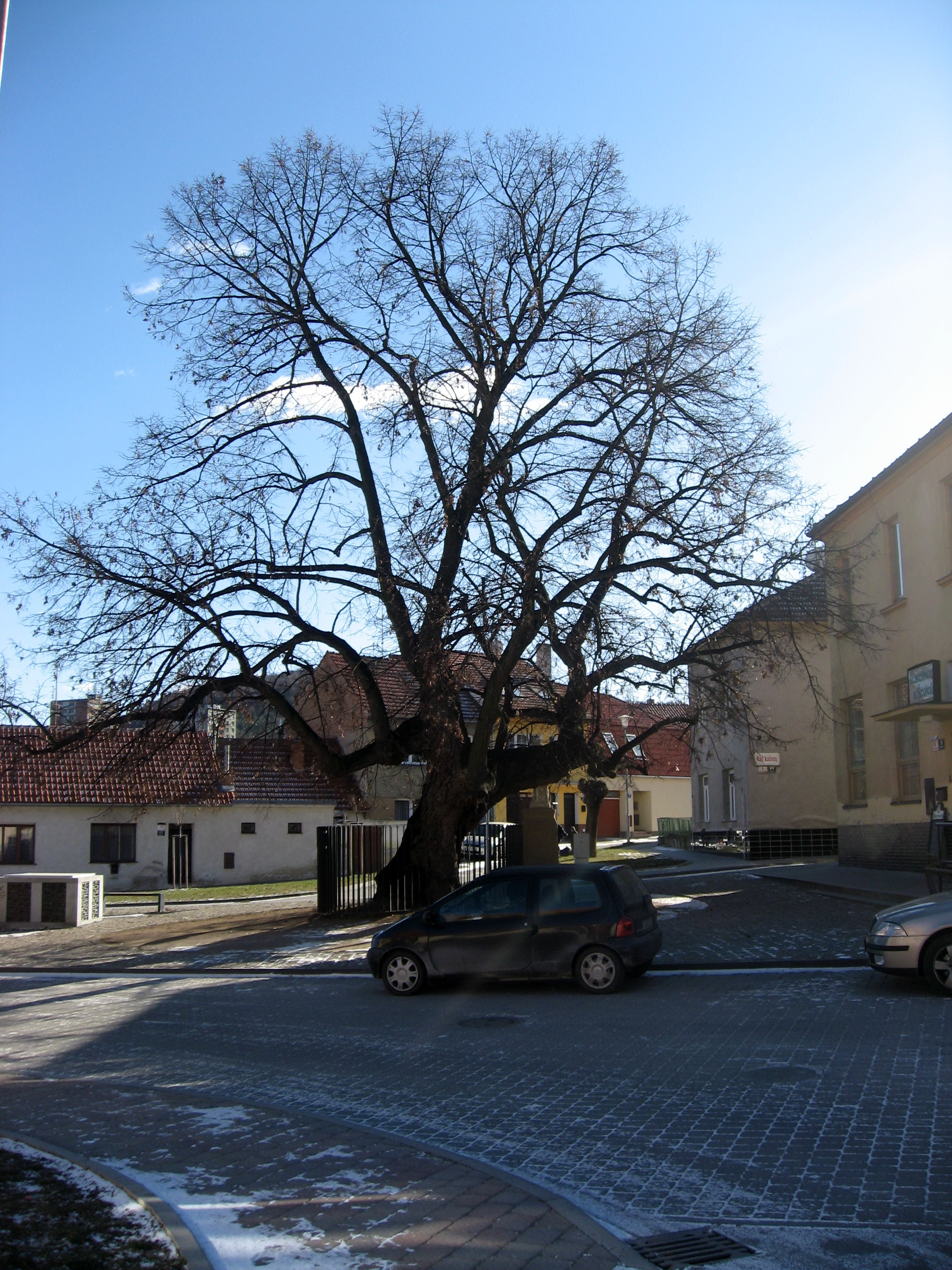 památná lípa v Bystrci